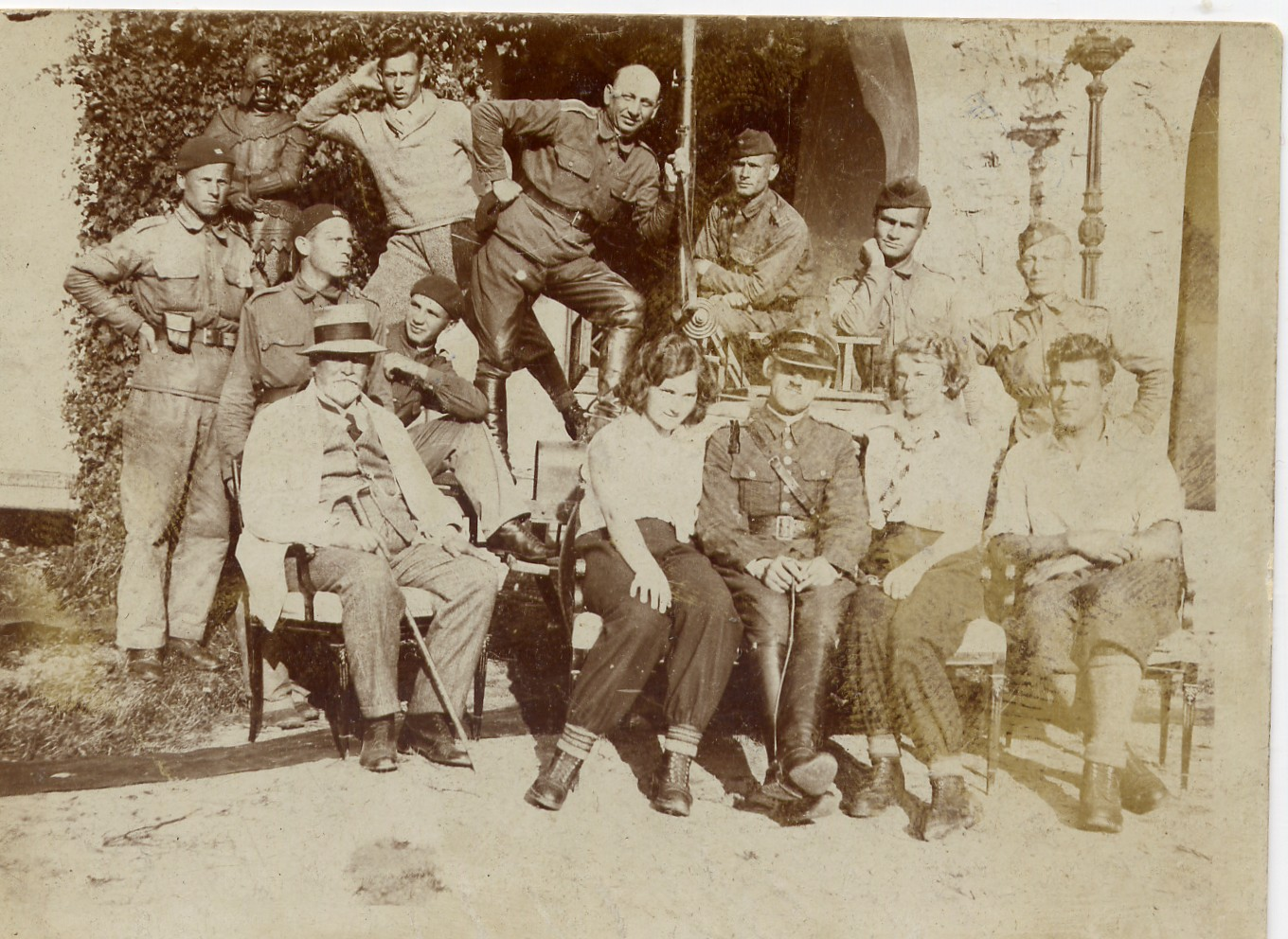 Ludwik Danielak w majątku hr, Schonbecka w Mierzwinie (zamek) - fotografia - archiwum rodzinne